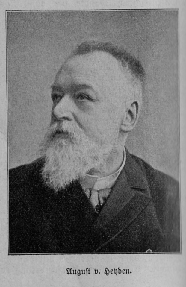 Porträt August von Heyden